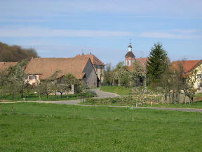 village de Banvillars (Territoire de Belfort) vu de puis la route de Dorans Photo prise le 16 avril 2004 par LP90. Licence GFDL LP90 avril 2004